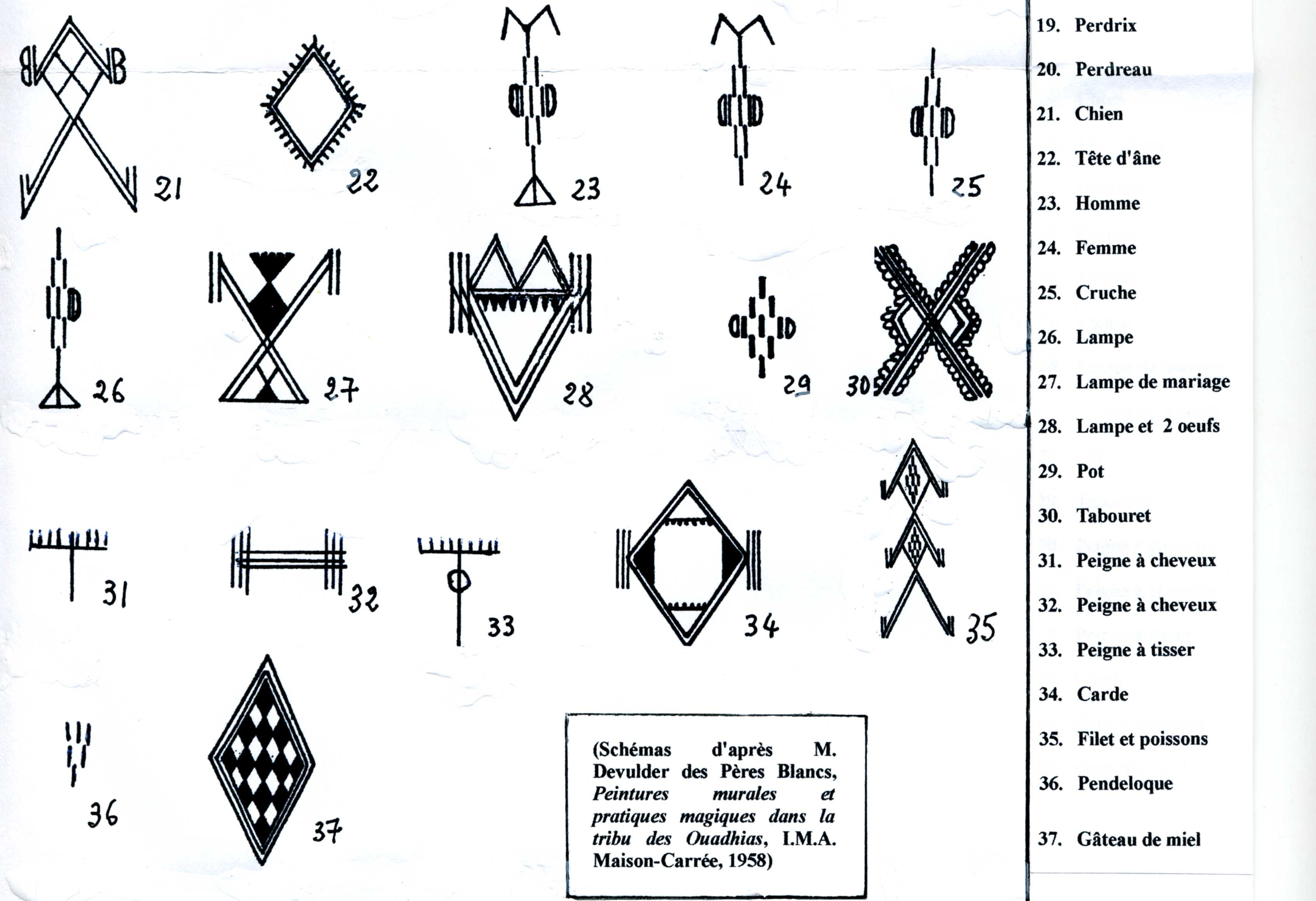 Signes de peintures murales de Kabylie (Algérie) 2